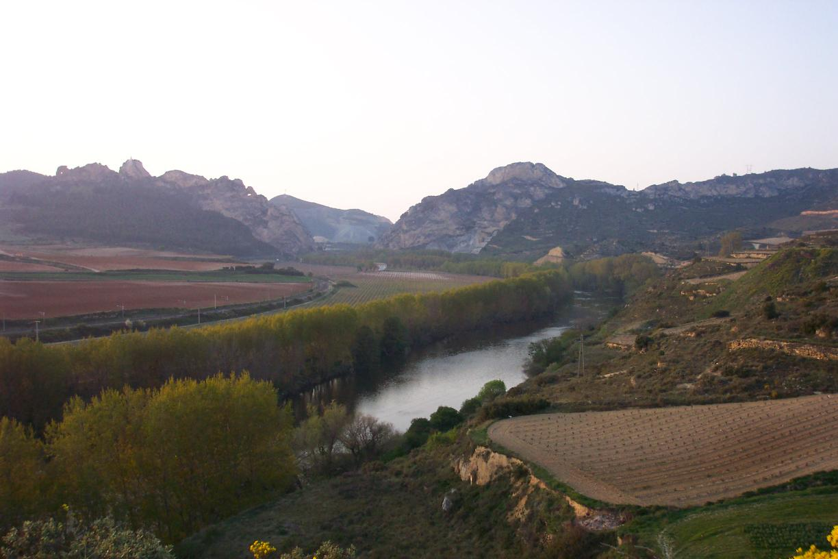 Entorno de Bilibio, aldea desaparecida a orillas del Ebro, en La Rioja (España) Foto sacada desde el Portal de La Rioja en Briñas.